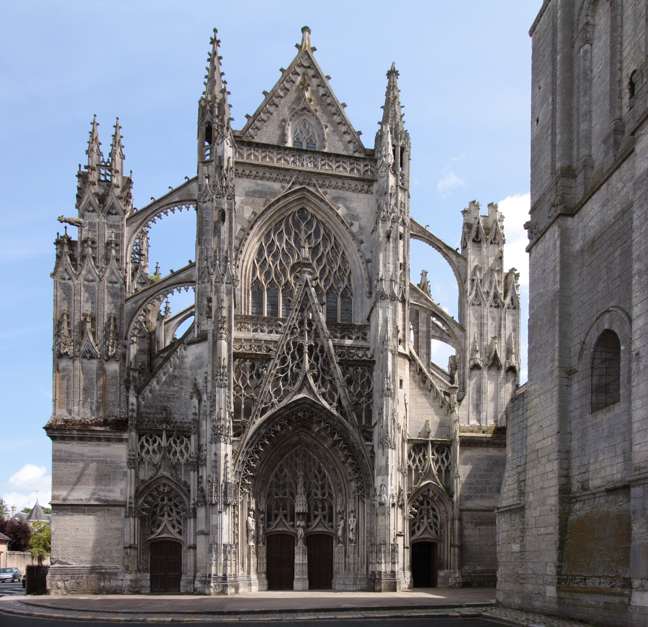 Kirche der ehemaligen Dreifaltigkeitsabtei in der Kleinstadt Vendôme im Département Loir-et-Cher/Frankreich - Fassade mit Wimperg über dem Portal und Maßwerk im Flamboyant-Stil der Spätgotik